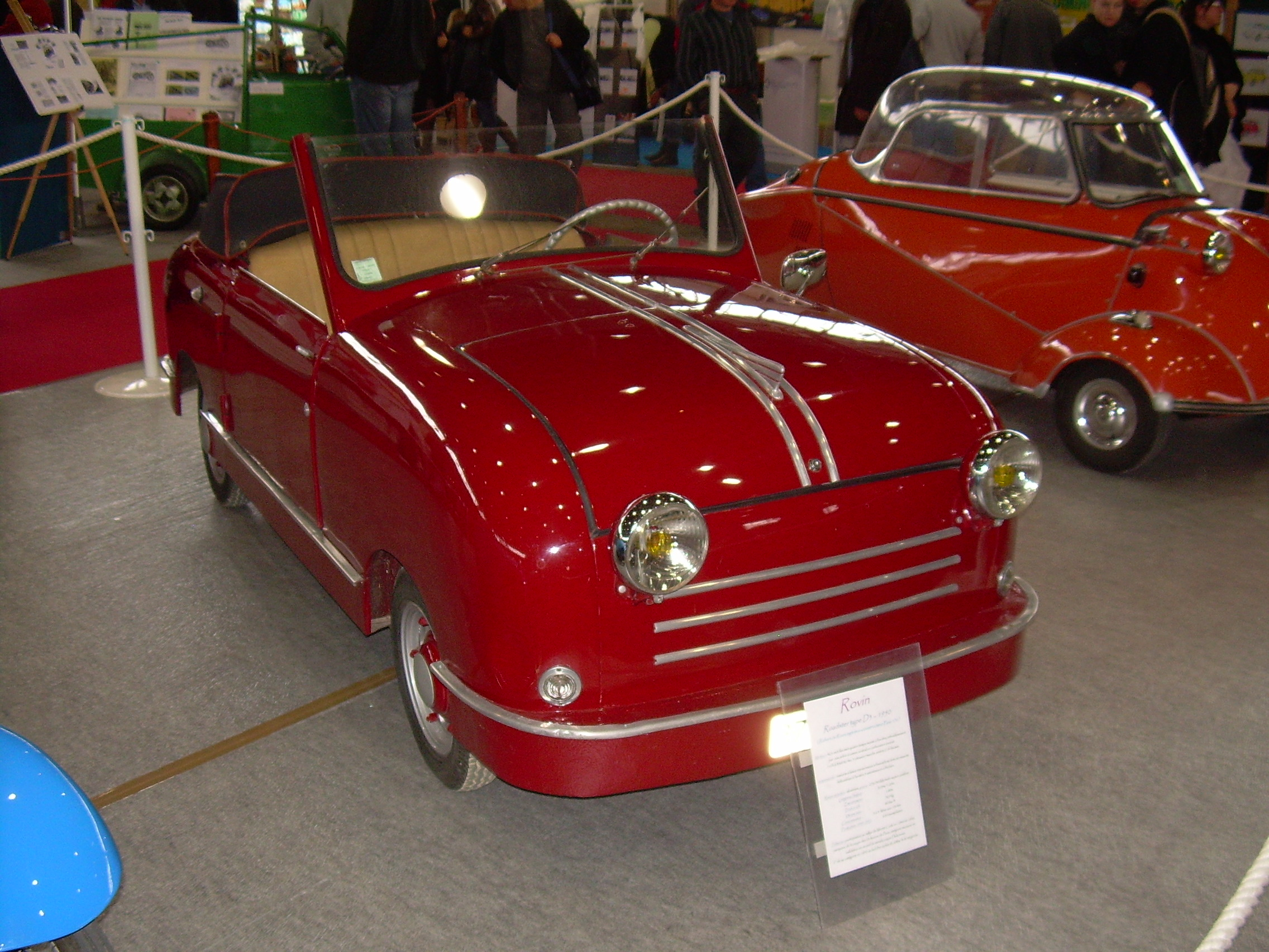 Epoqu'auto 2007